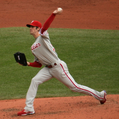 Cole Hamels